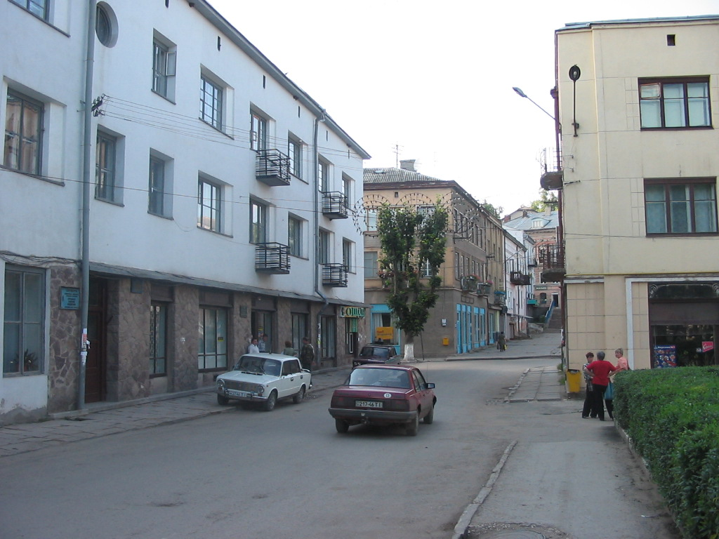 Buchach, Ukraine